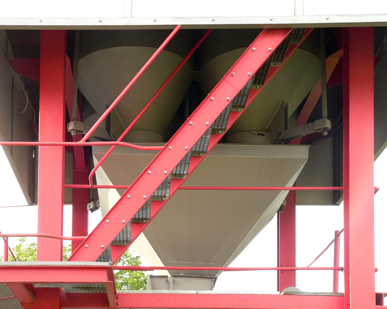 Kartoffeldämpfanlage Stöckse